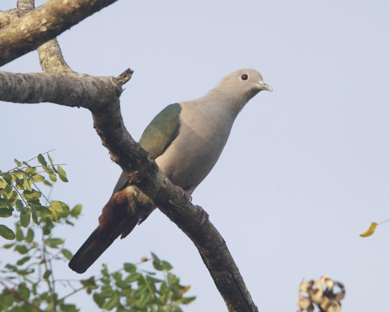 Green Imperial-Pigeon Ducula aenea ssp Ducula aenea pusilla Lunuganga, Bentota, Sri Lanka 8th. February 2011 Distribution: 690V0735